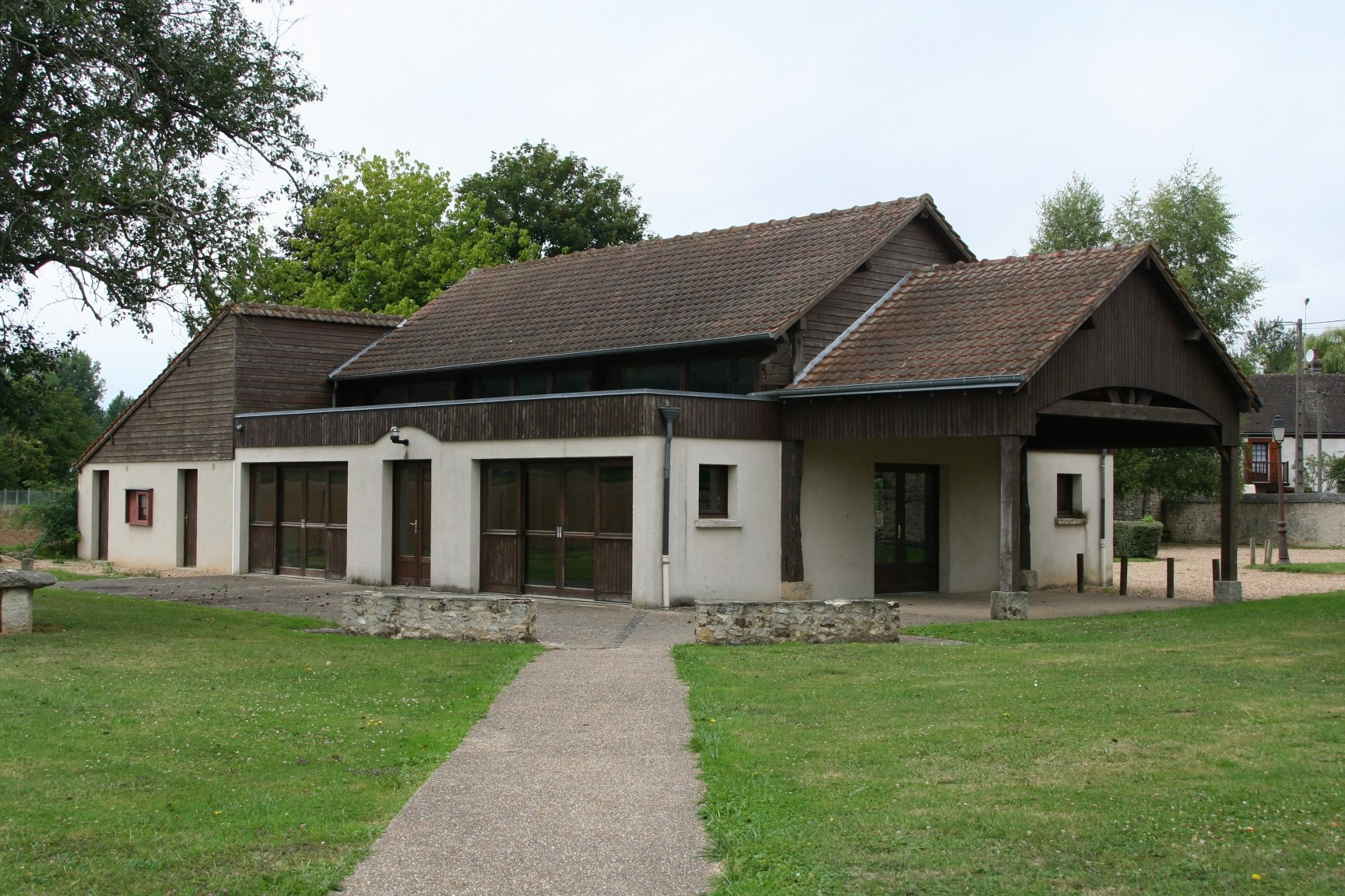 Salle des fêtes d'Amenucourt - Val-d'Oise, France